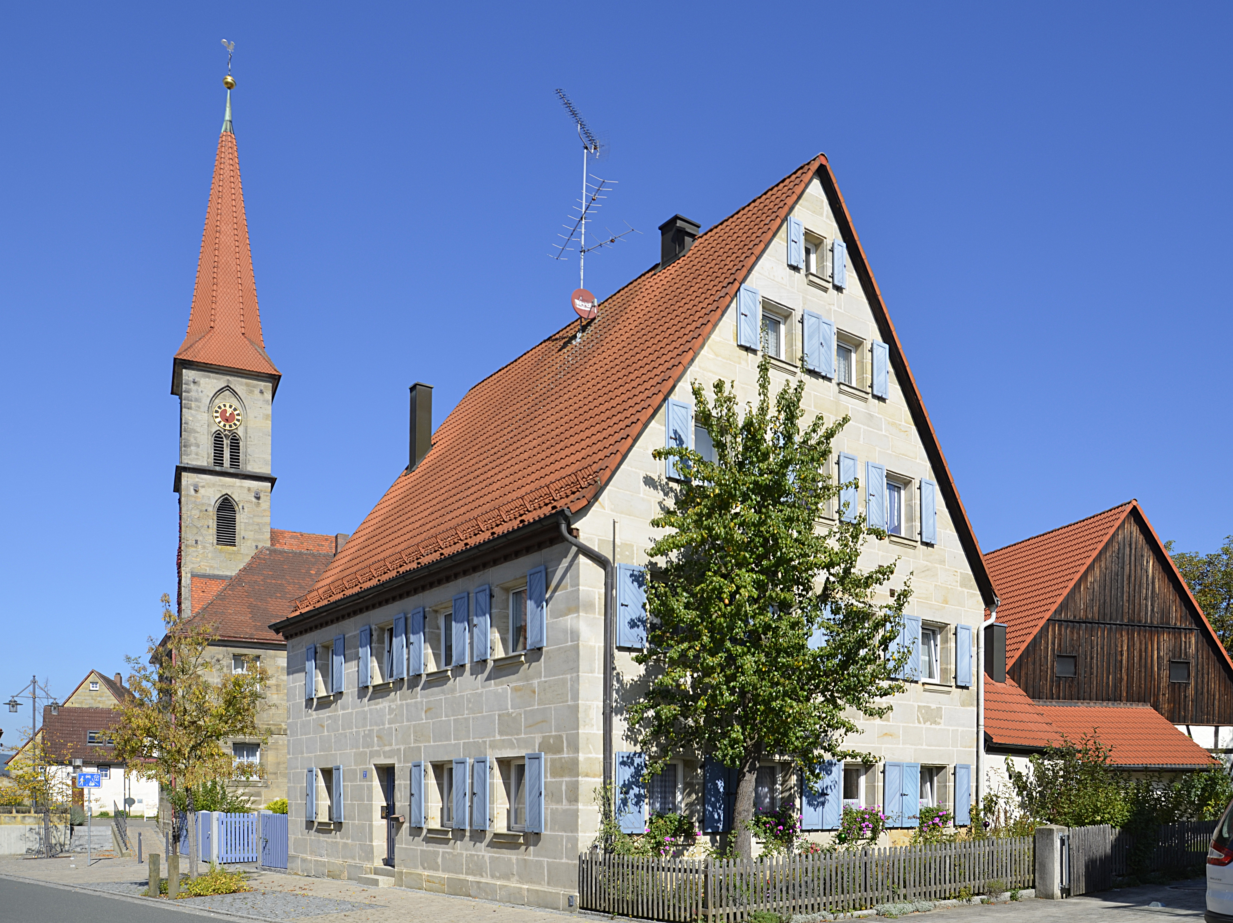 Eschenau Herrengasse 1This is a photograph of an architectural monument.